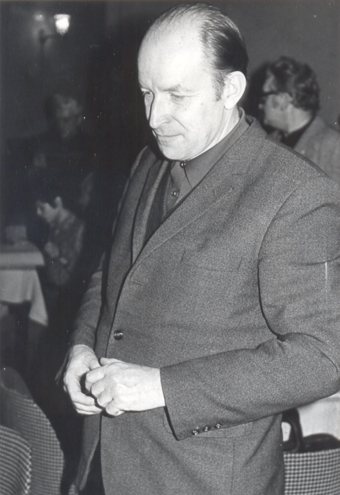 R.D. Josef Knödl, v únoru 1978